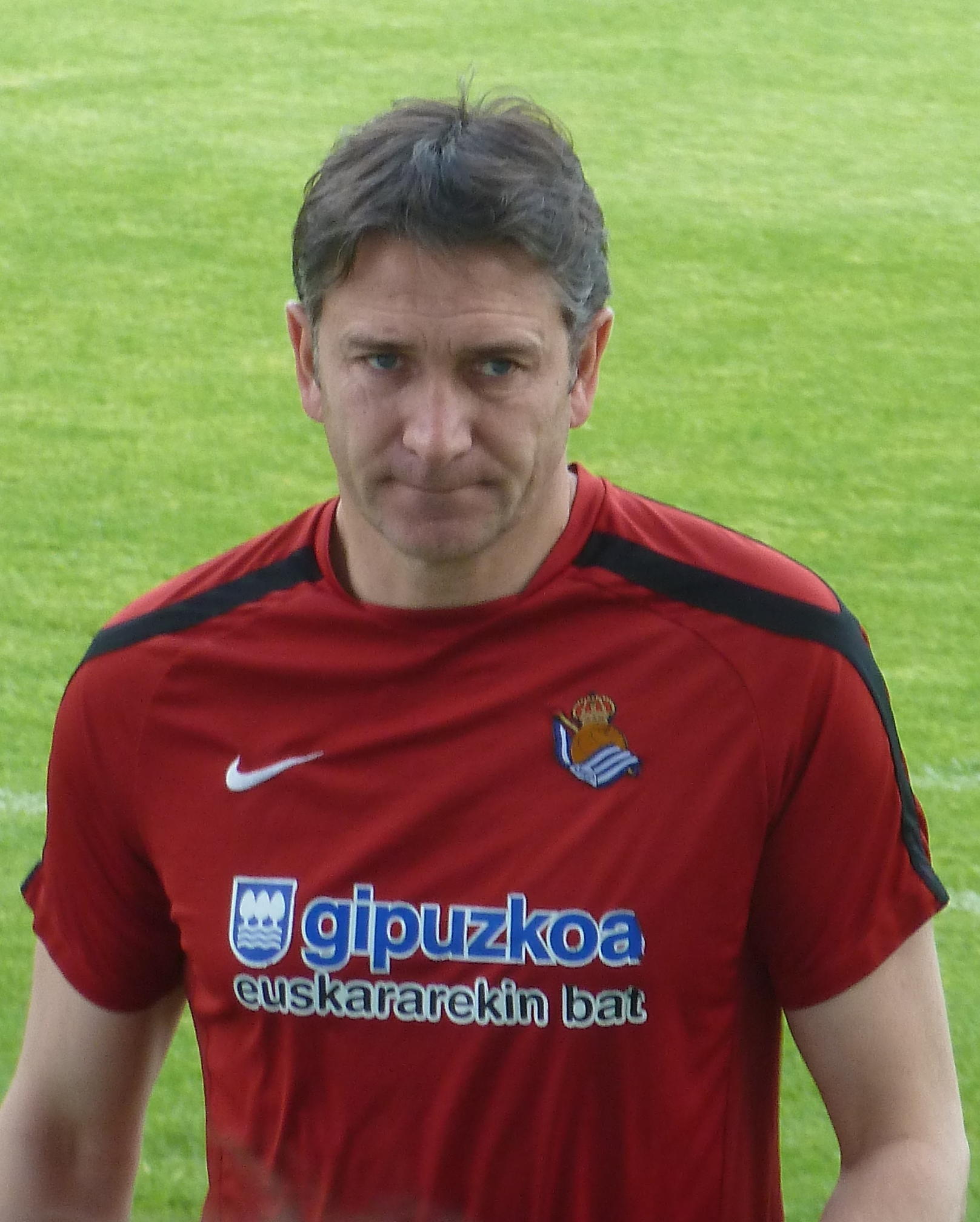 Montanier como entrenador de la Real Sociedad en las instalaciones de Zubiera